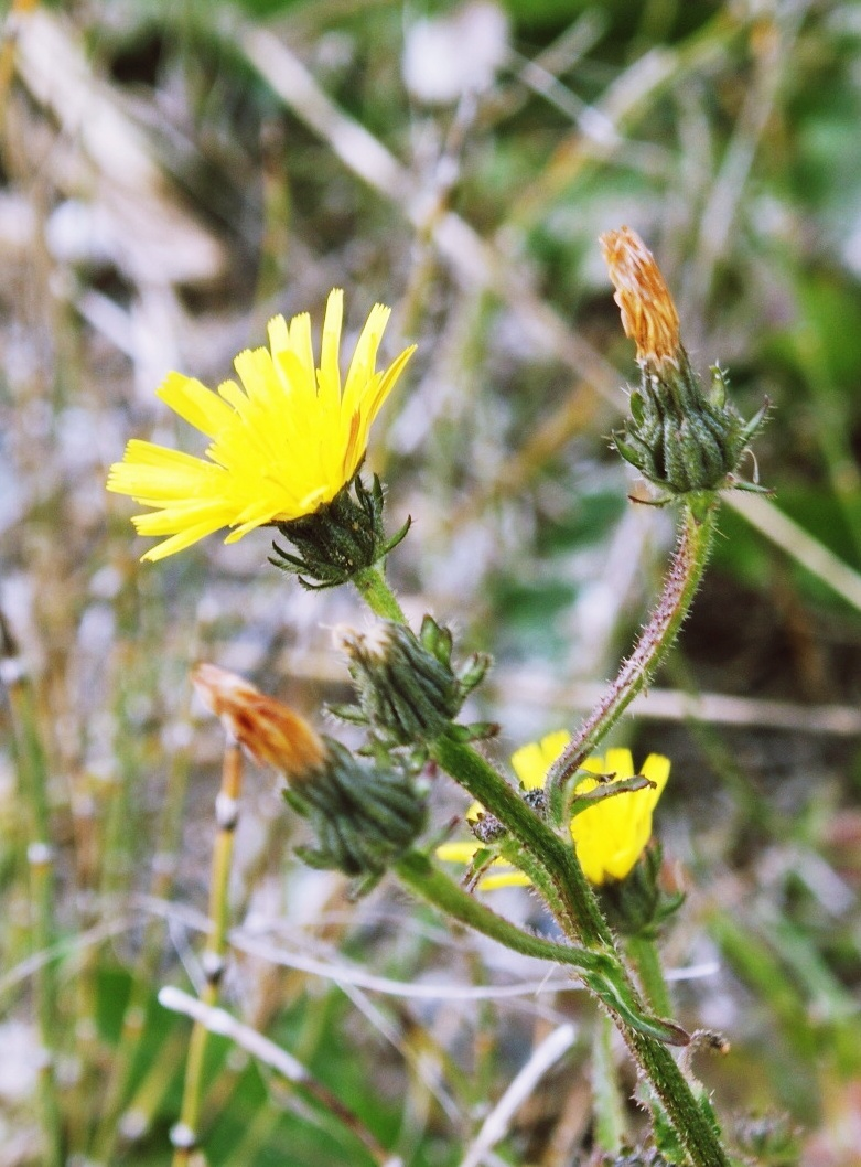 Ejemplo de encuadre vertical